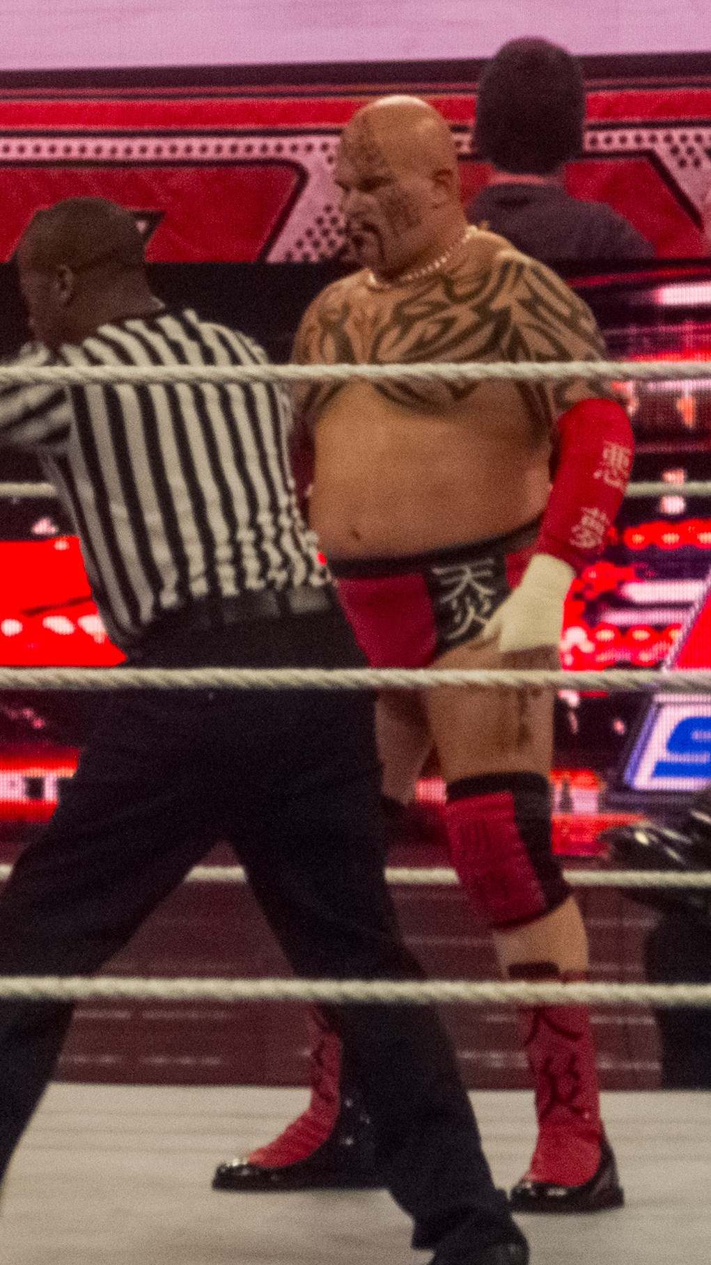 WWE Post-Wrestlemania 28 RAW